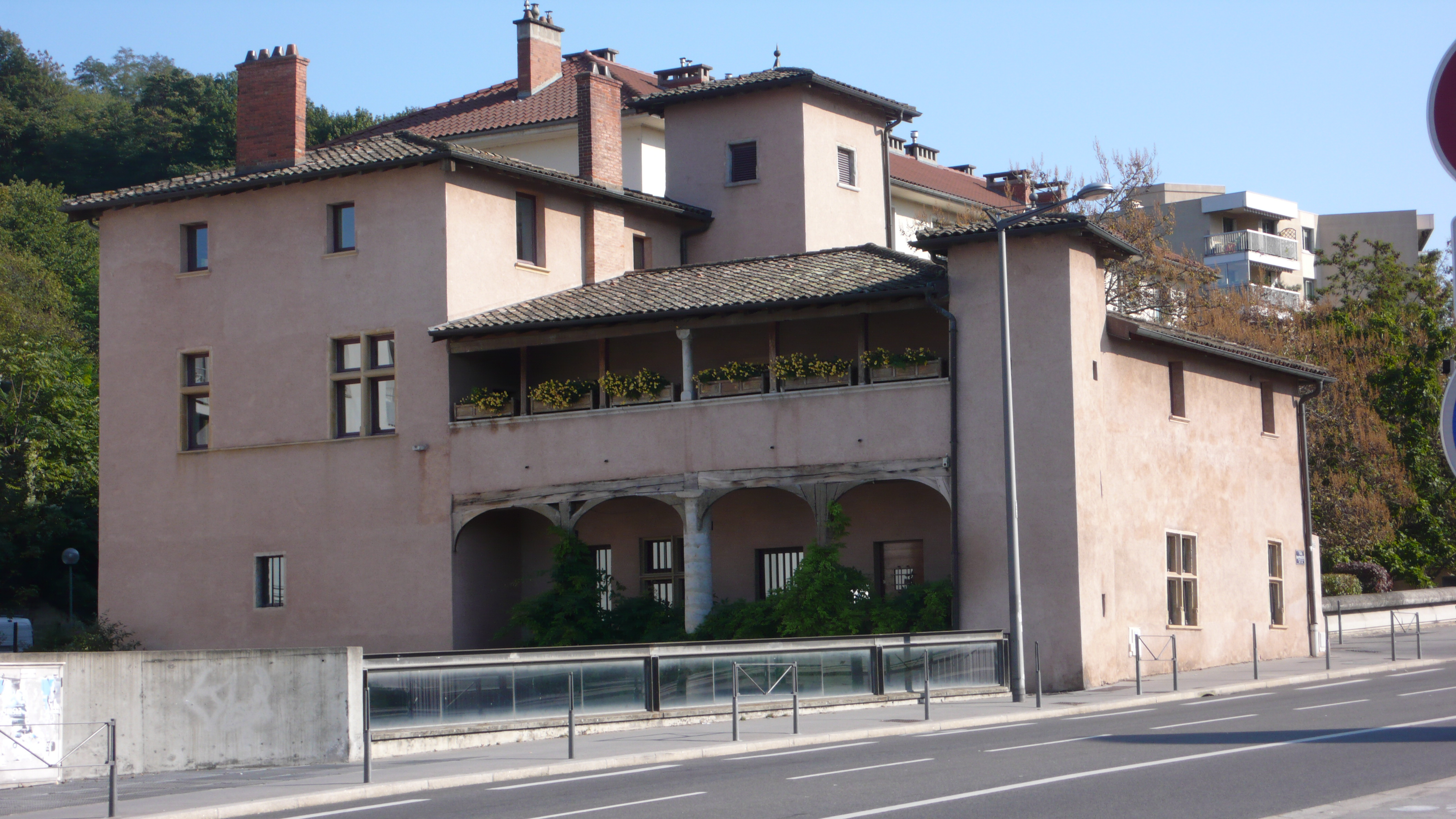 Ancienne bâtisse de Gorge du Loup (F-69009, Lyon). Villa Bini - 55 rue Sergent Michel Berthet - siège de la CGPME (Confédération générale du patronat des petites et moyennes entreprises) du Rhône-Alpes.